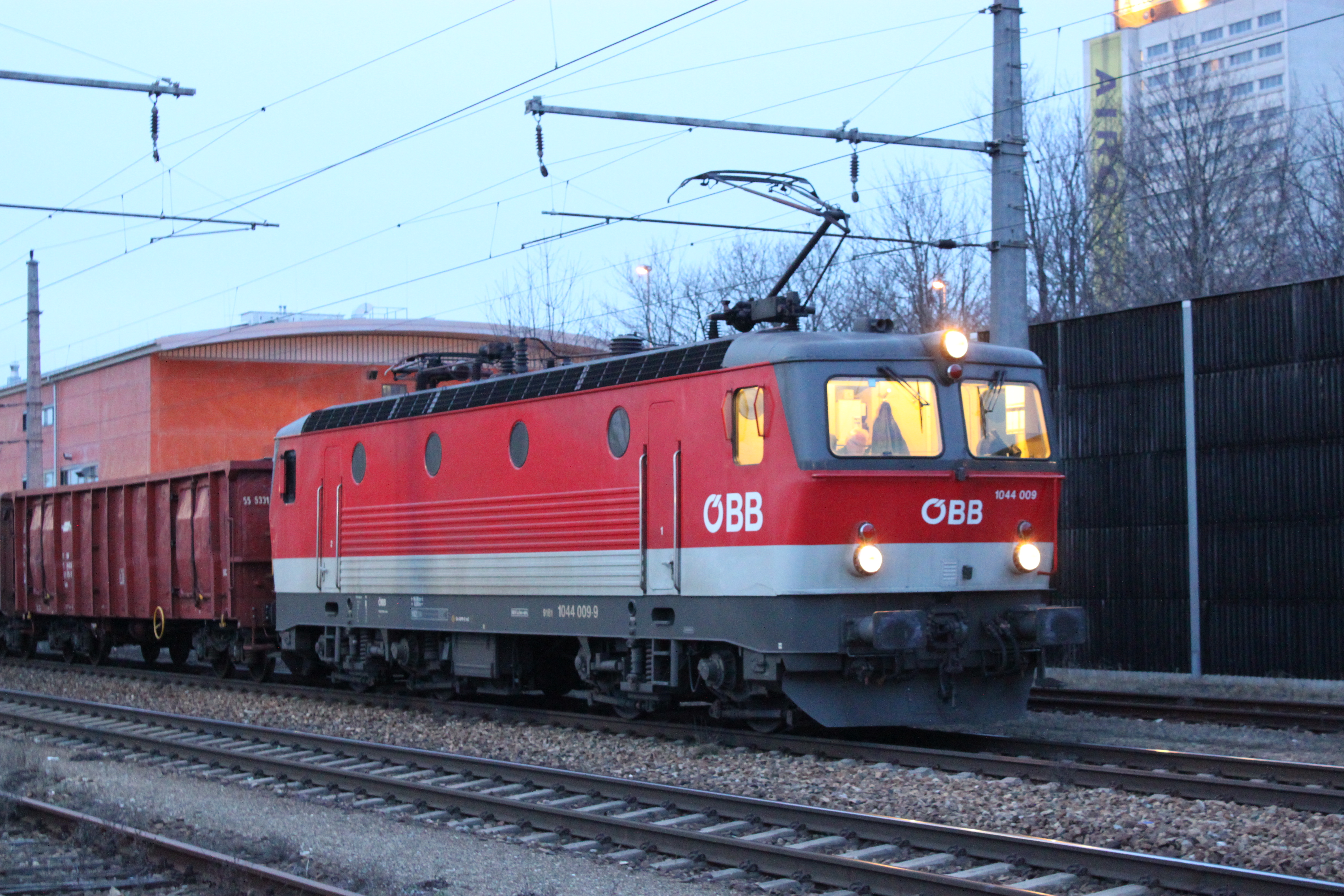 ÖBB 1044 009 am 27.2.2012 auf der Donauländebahn bei Oberlaa